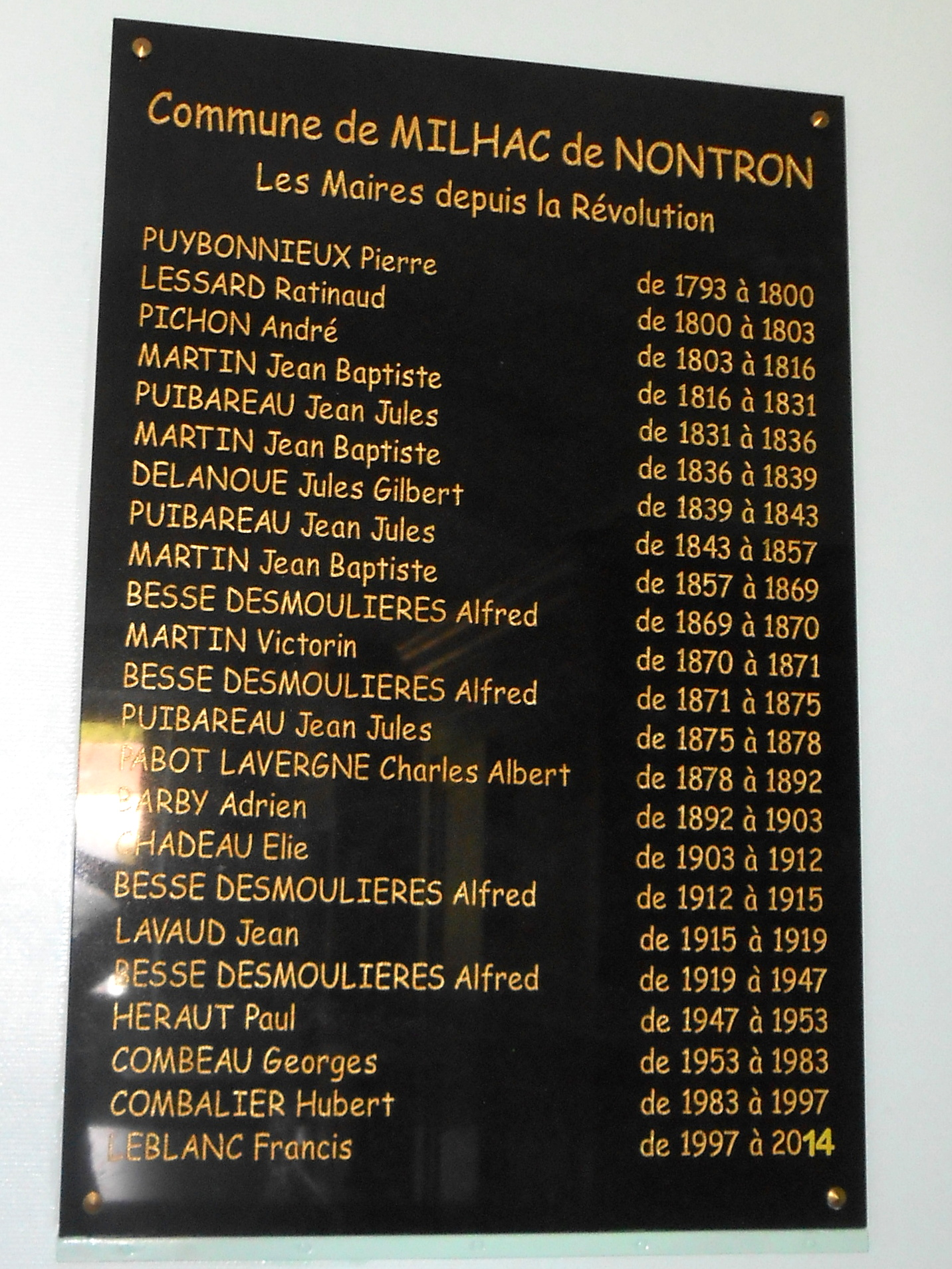 Mairie, Milhac de Nontron, Dordogne, France - plaque avec les noms des maires depuis la Révolution jusqu'à 2014.